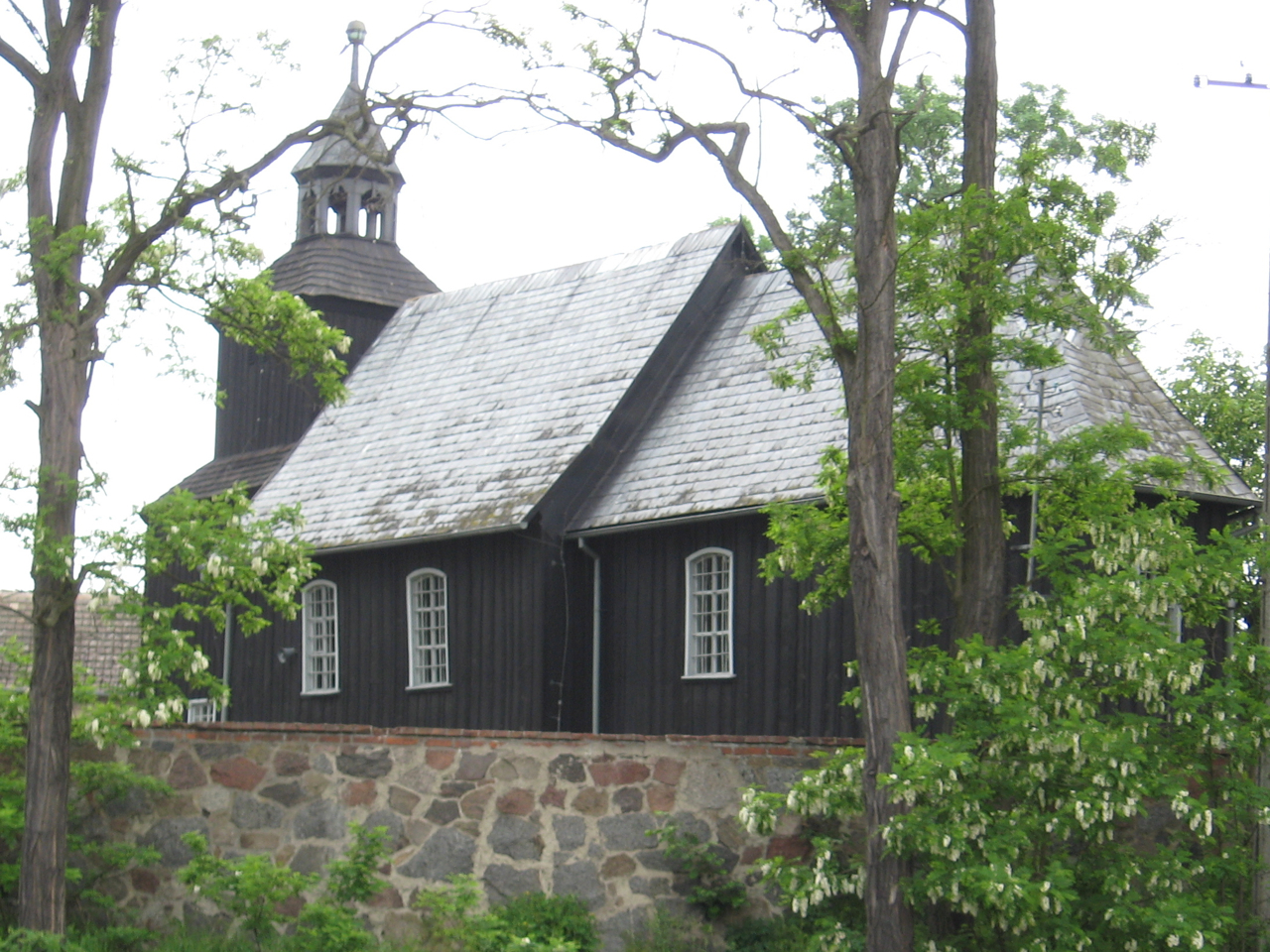 Kościół pw. Wszystkich Świętych w Niechłodzie w gminie Święciechowa.